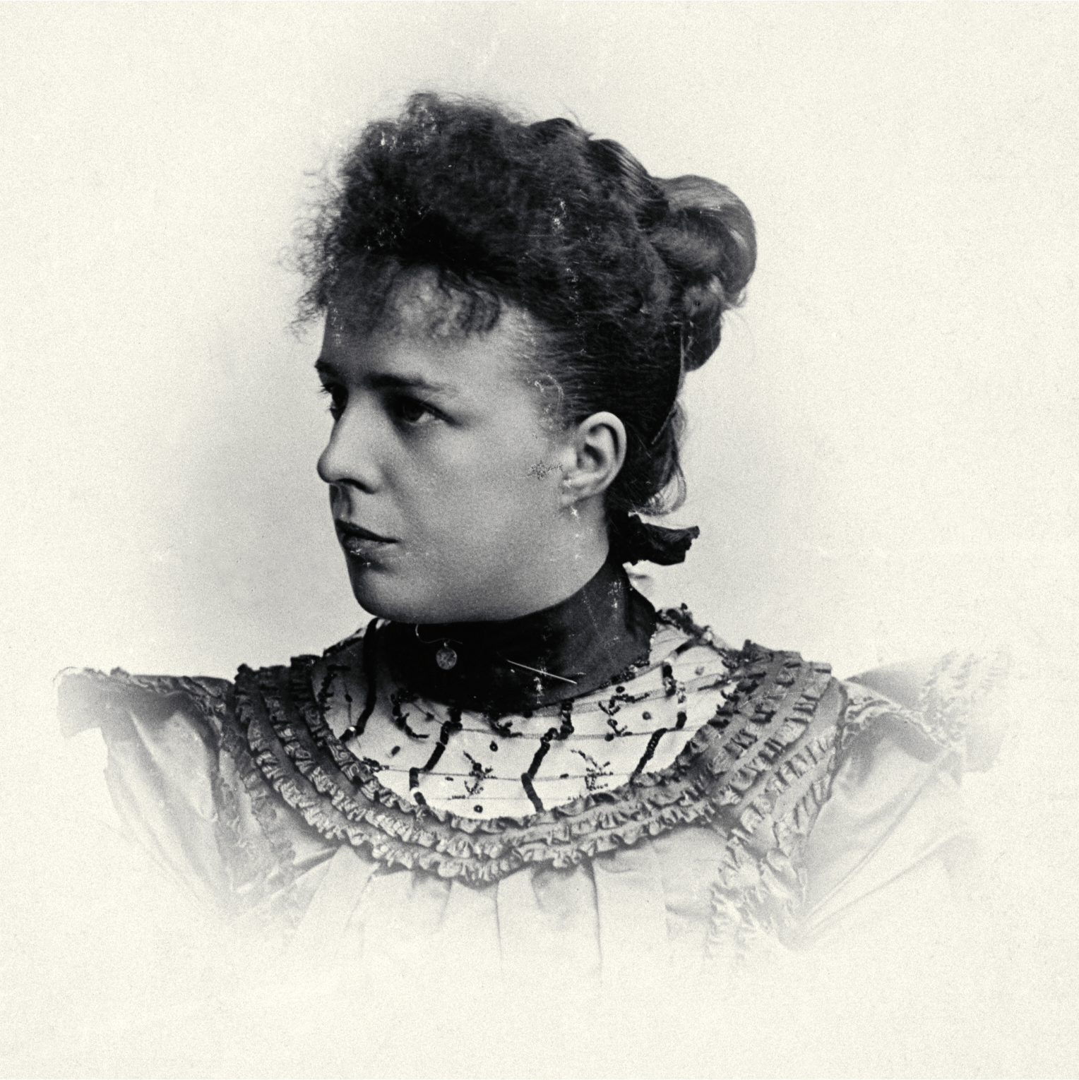 Esther Welmoet Wijnaendts Francken-Dyserinck (1876-1956), 1899. Haar archief, inventarisnummer 4